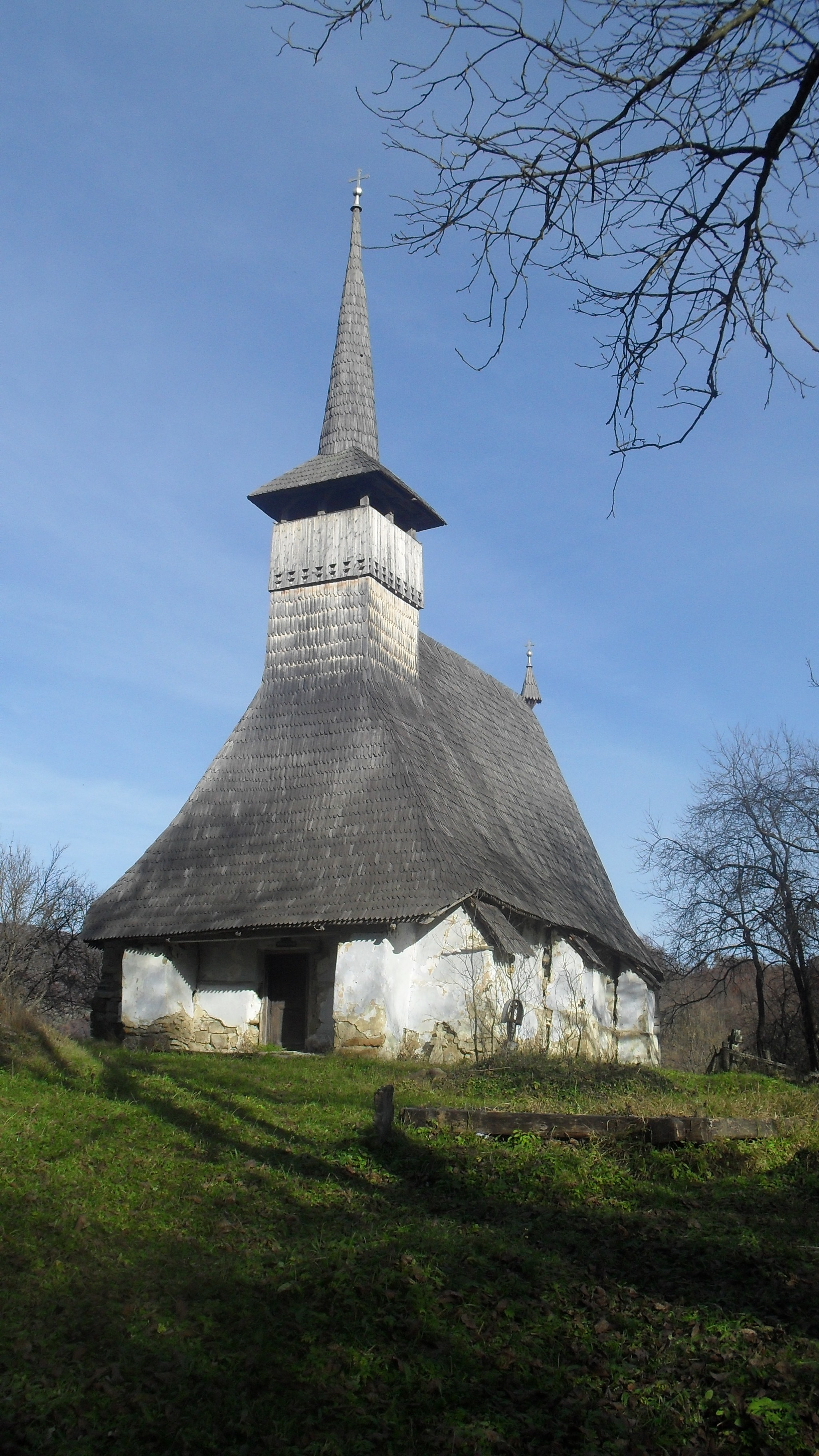 Biserica Sf. Arhangheli Mihail si Gavril din Strambu